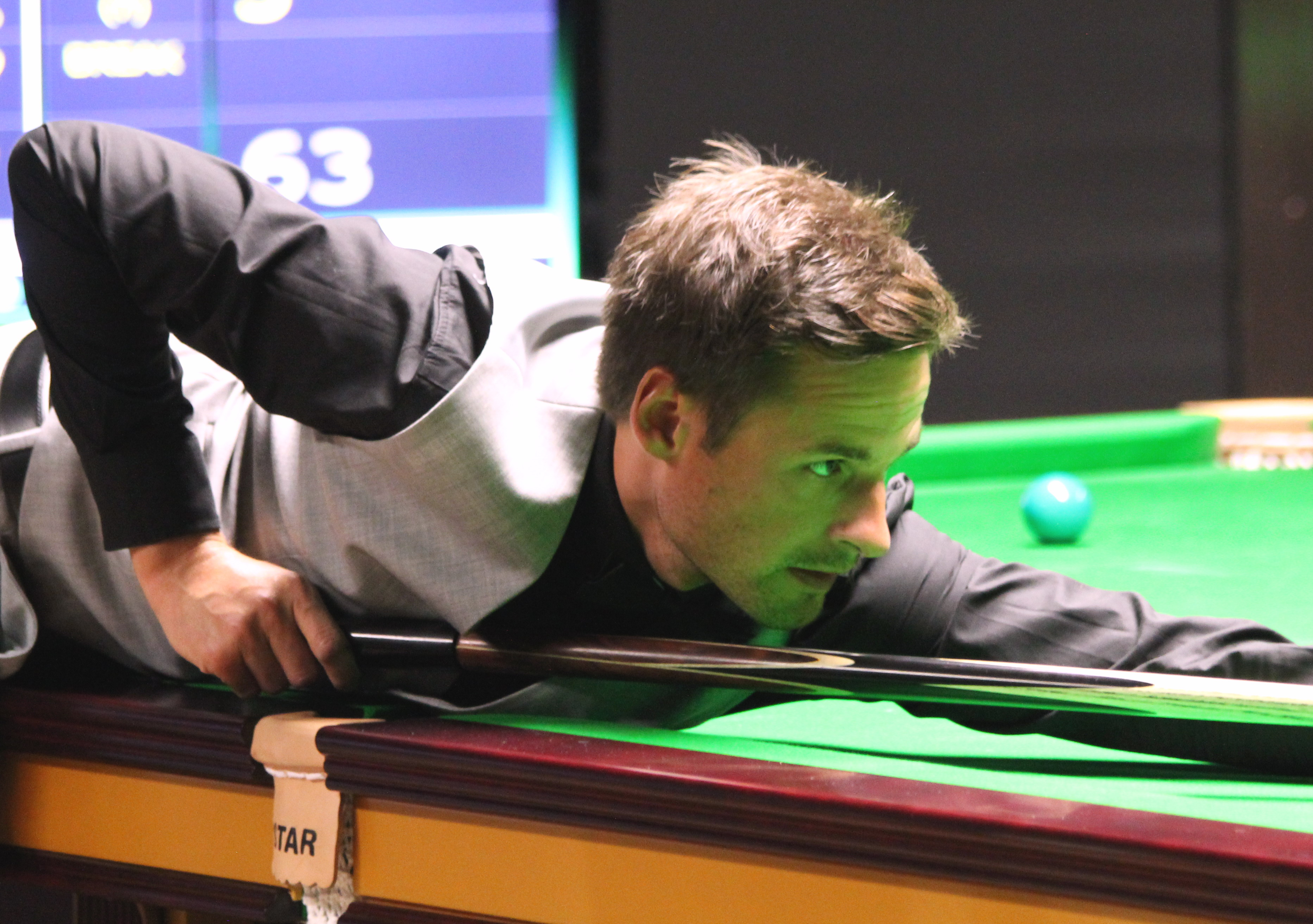 David Gilbert beim Paul Hunter Classic 2016